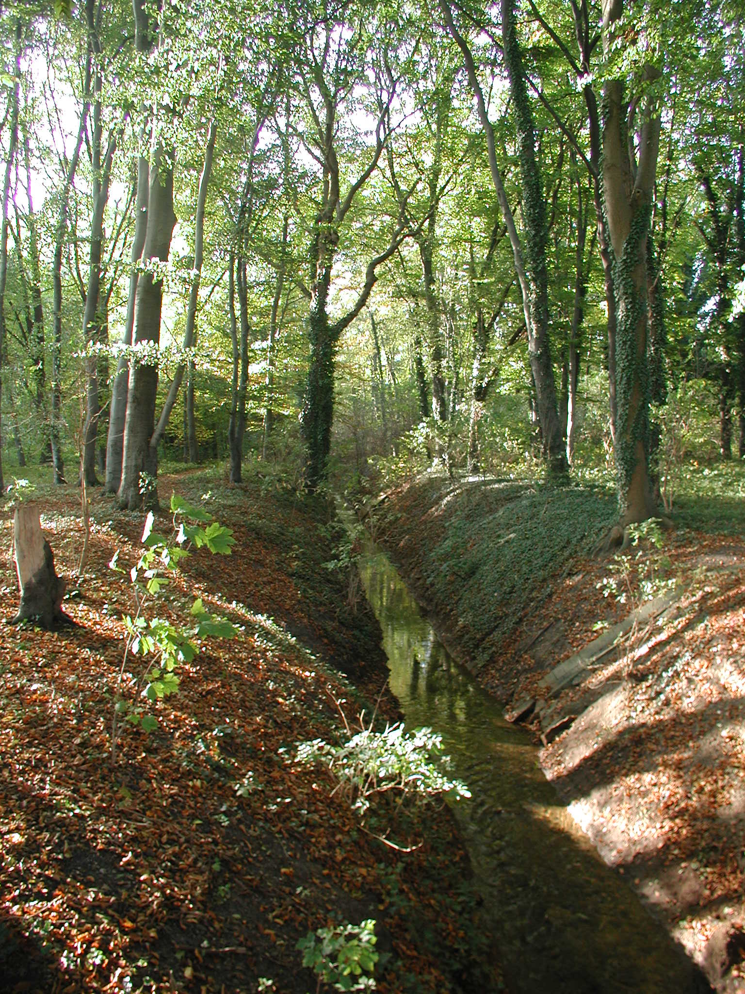 Hürth-Efferen, der kanalisierte Duffesbach (Ortsausgang)